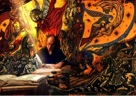 Jean luc en train de travaille entoure de toutes ses enluminures